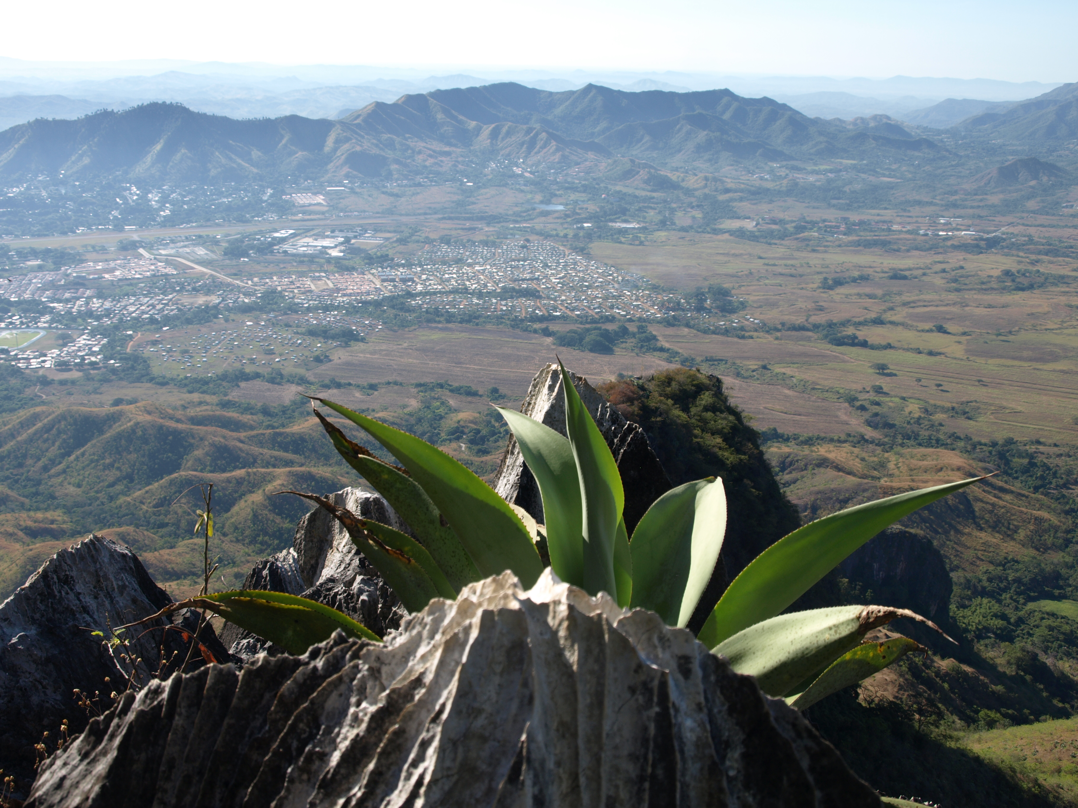 A LO LEJOS CONTEMPLO DESDE MI LENTE VERDES TONOS.